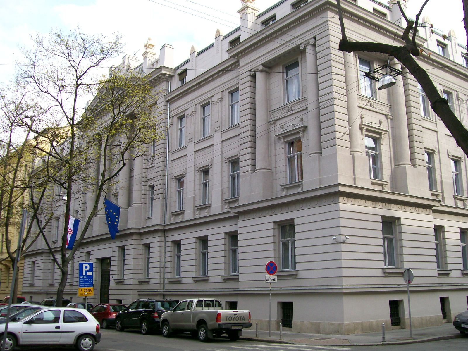 Zgrada Ministarstva financija Zagreb